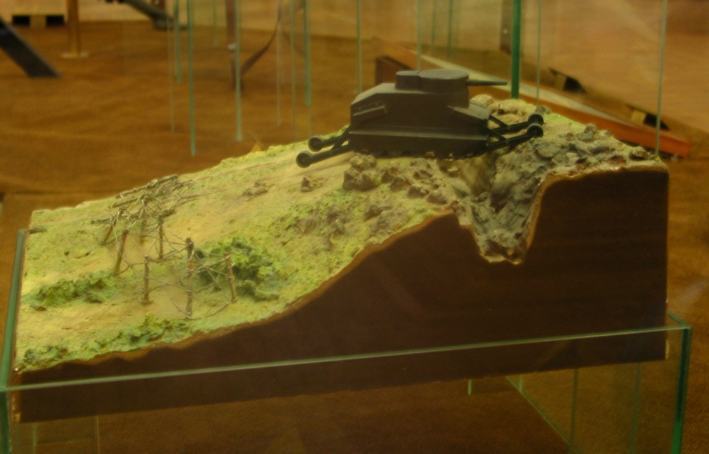 Modell des „Burstyn-Panzers“ von Gunther Burstyn (1879-1945) aus dem Jahr 1911